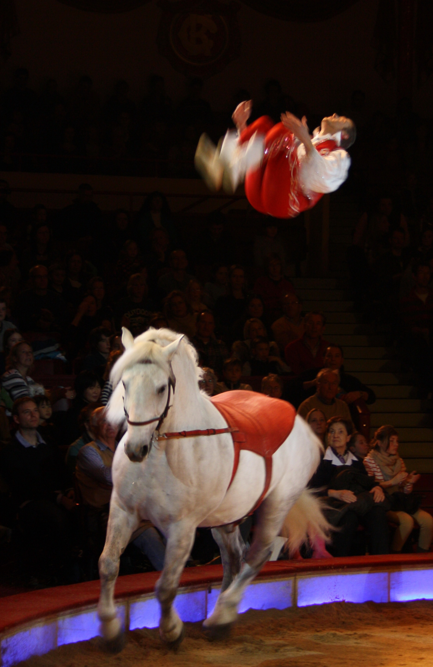 Familie Donnert aus Ungarn. Akrobatik auf dem Pferd.